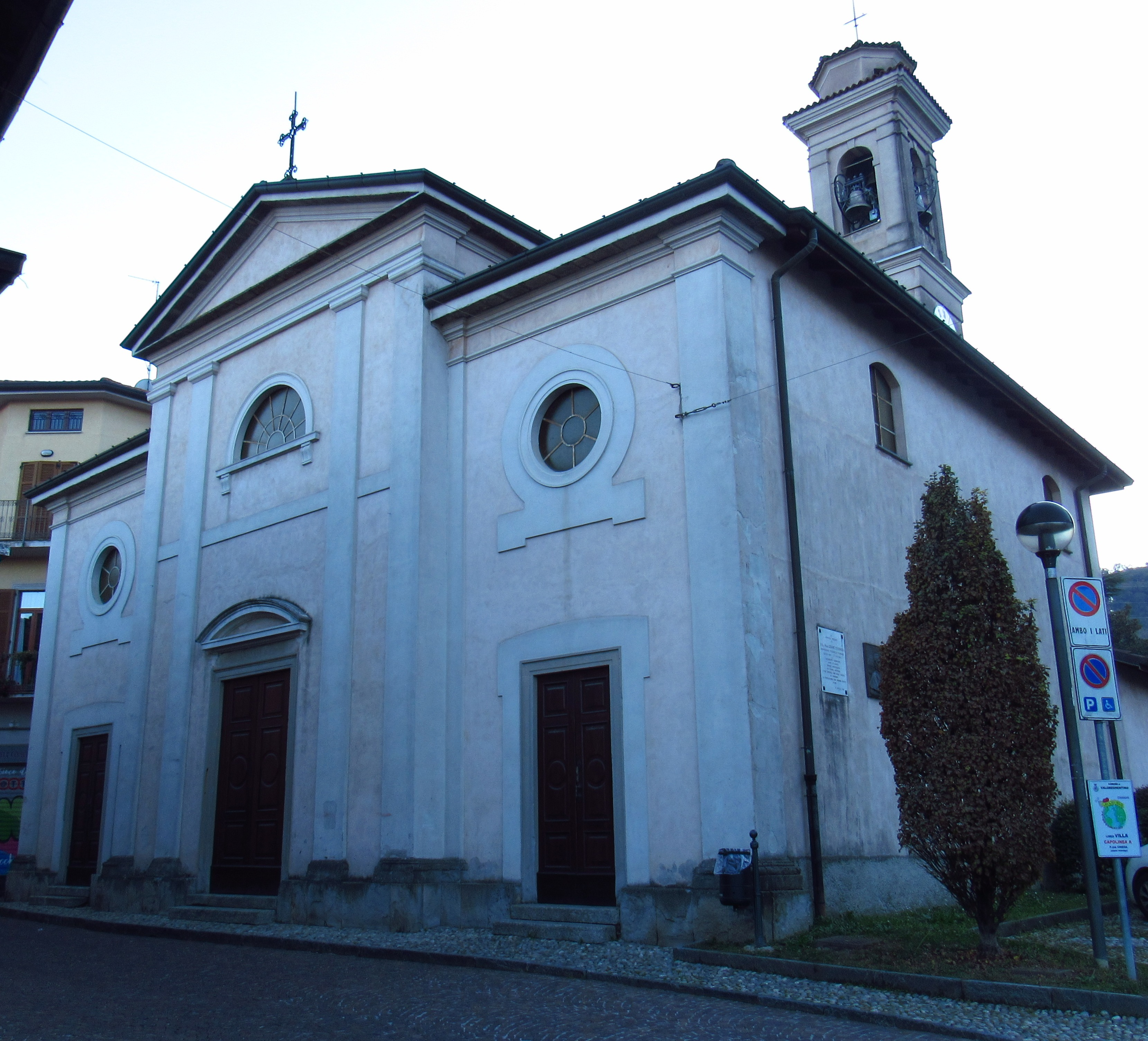 Chiesa vecchia di Villa San Carlo, comune di Valgreghentino, provincia di Lecco, Lombardia, Italia